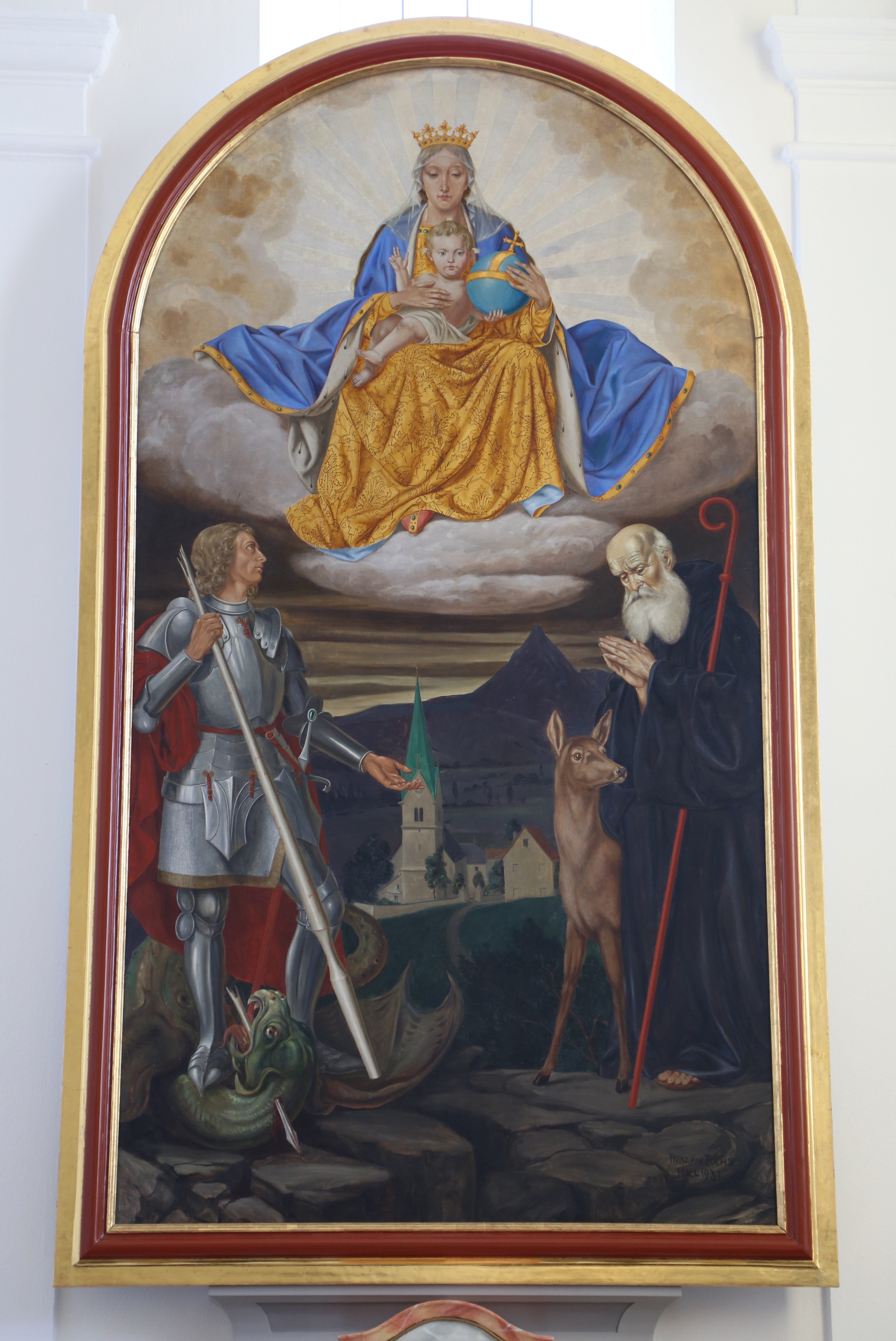 Kath. Pfarrkirche hl. Ägidius, Schwoich